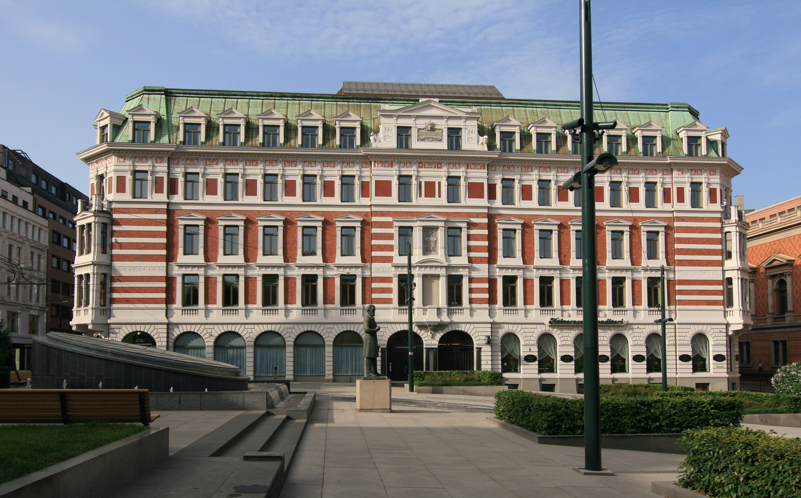 Prinsens gate 26, Oslo. Architect: Henrik Nissen (1880-81), Christian Reuter (1898-99).